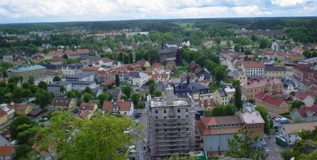 Söderköping från Ramunderberget. Foto Olof Ekström 2004